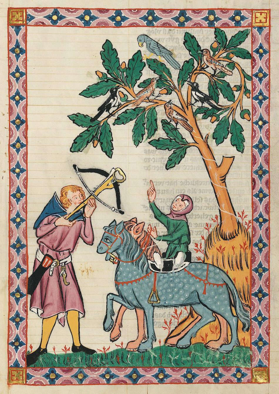 Codex Manesse, UB Heidelberg, Cod. Pal. germ. 848, fol. 396r: Kol von Nüssen